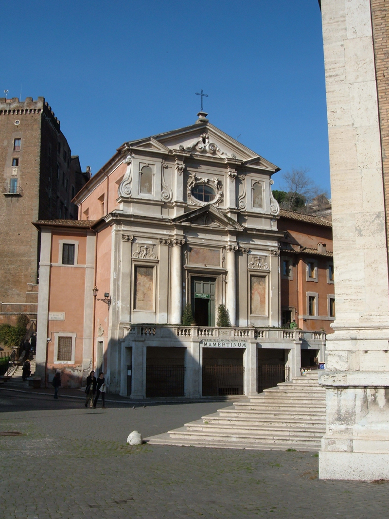 Chiesa di San Giuseppe dei Falegnami, nel rione Campitelli a Roma. Foto personale.